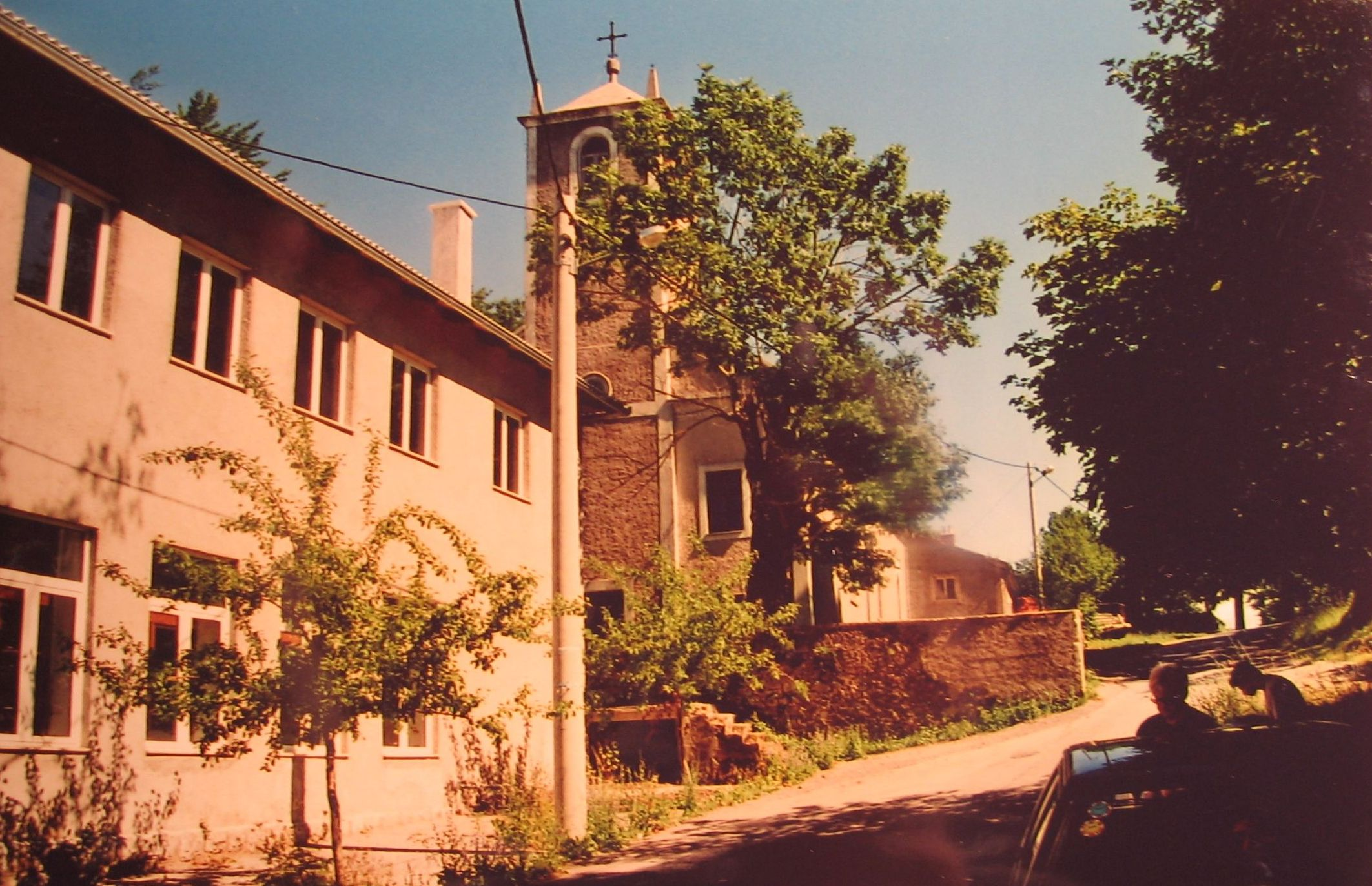 Selo Krivi put - Vlasništvo Zeljko